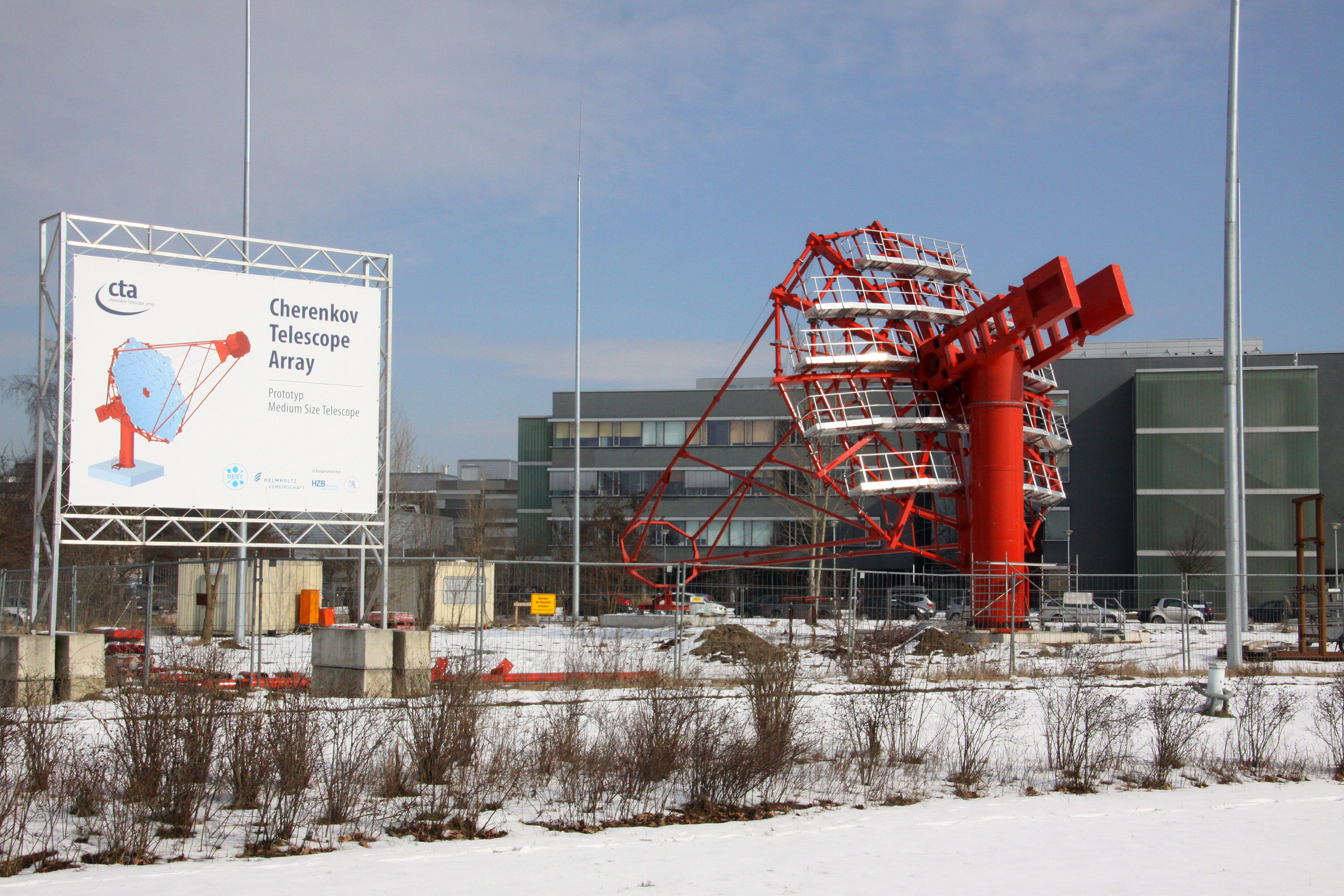 Prototyp-Aufbau eines Cherenkov-Teleskops für das CTA auf dem Gelände der WISTA in Berlin-Adlershof